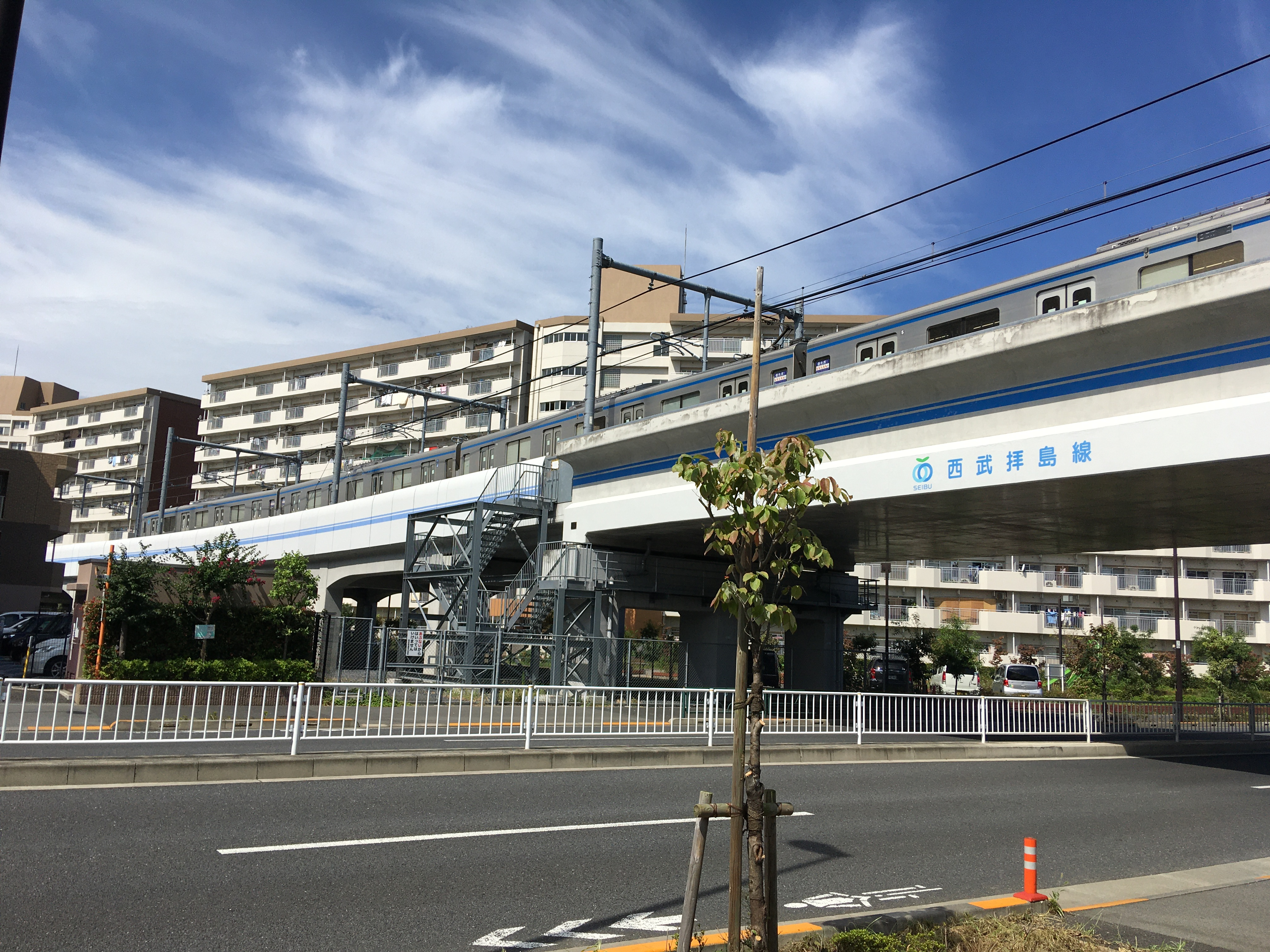 小平市内の府中街道との立体交差地点